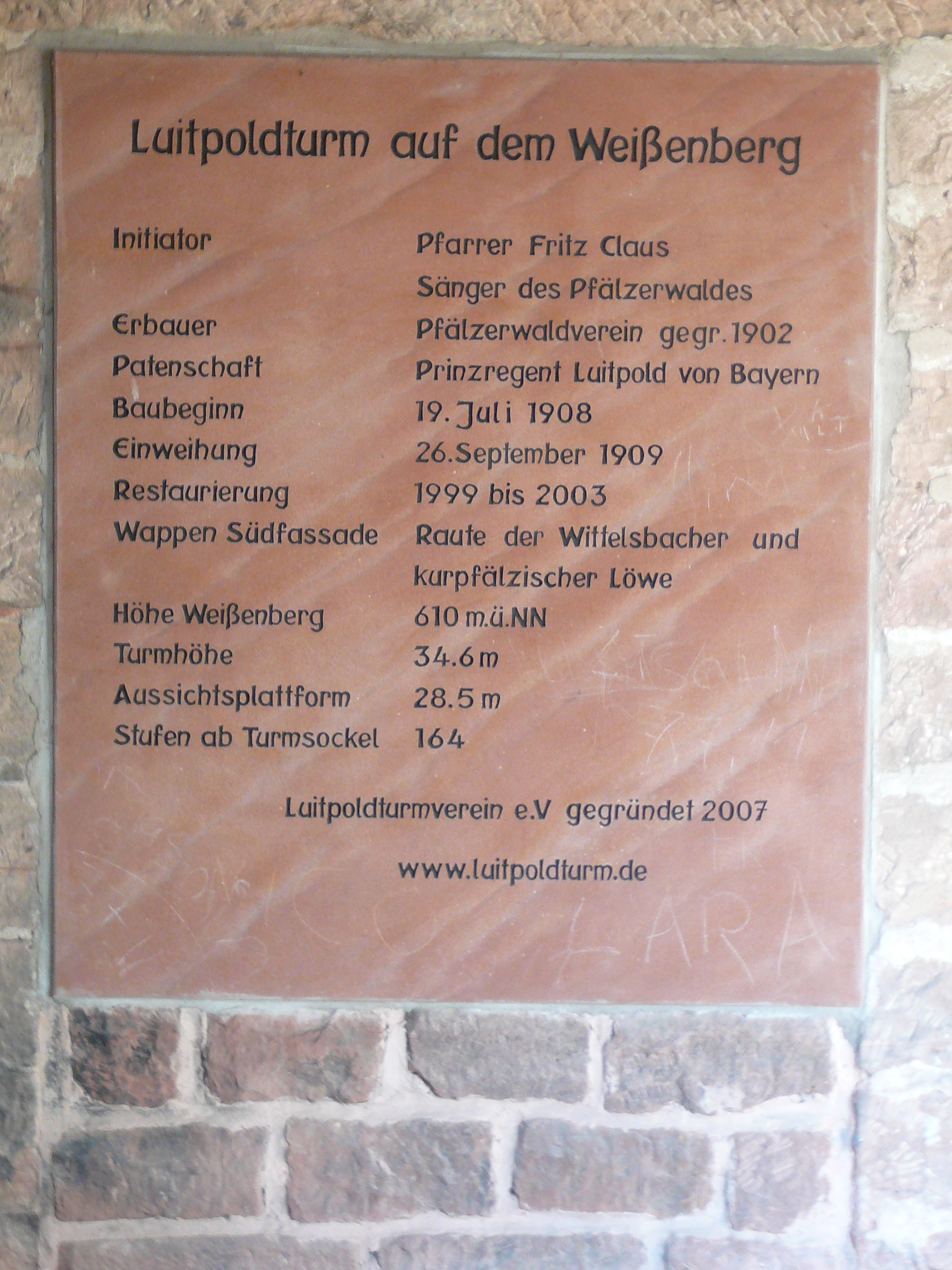 Baugeschichte des Luitpoldturms auf dem Weißenberg (Pfalz)